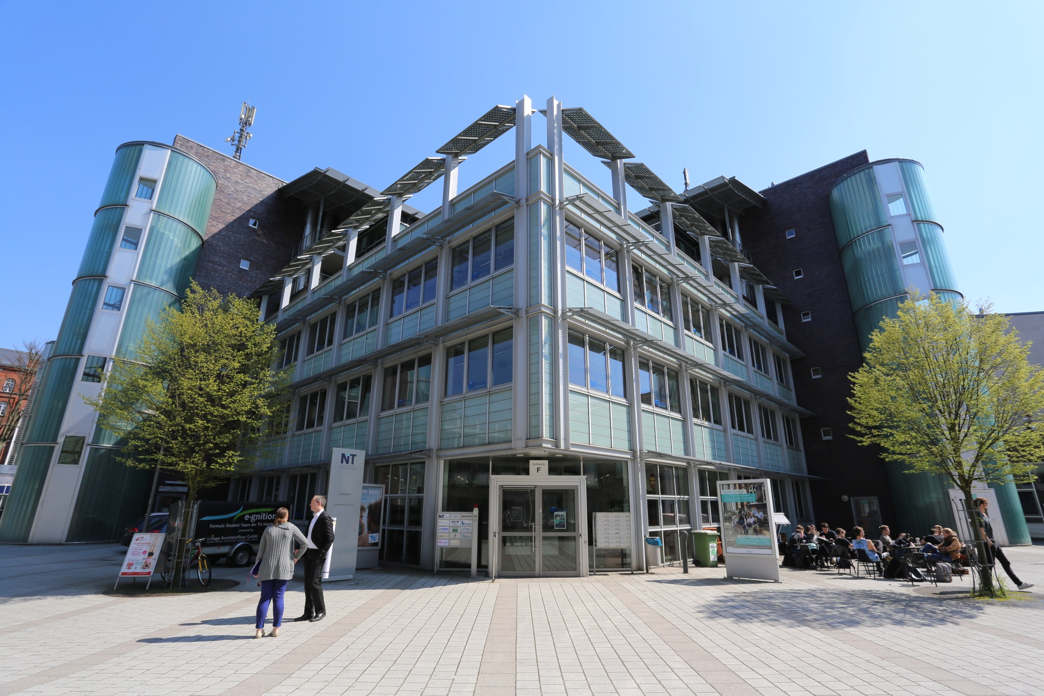 NIT, Gebäude F der TUHH